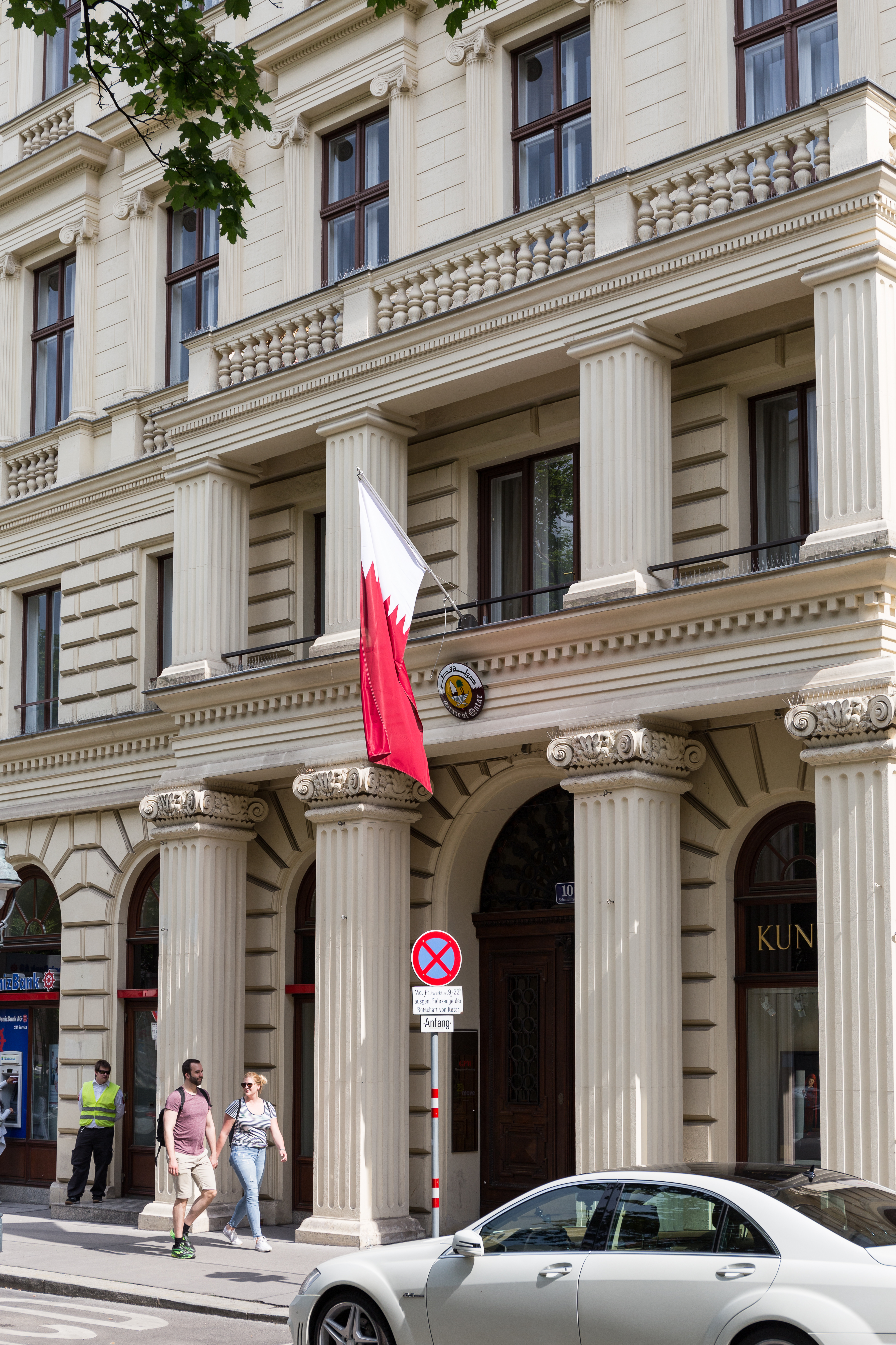 Ambassade du Qatar à Vienne.